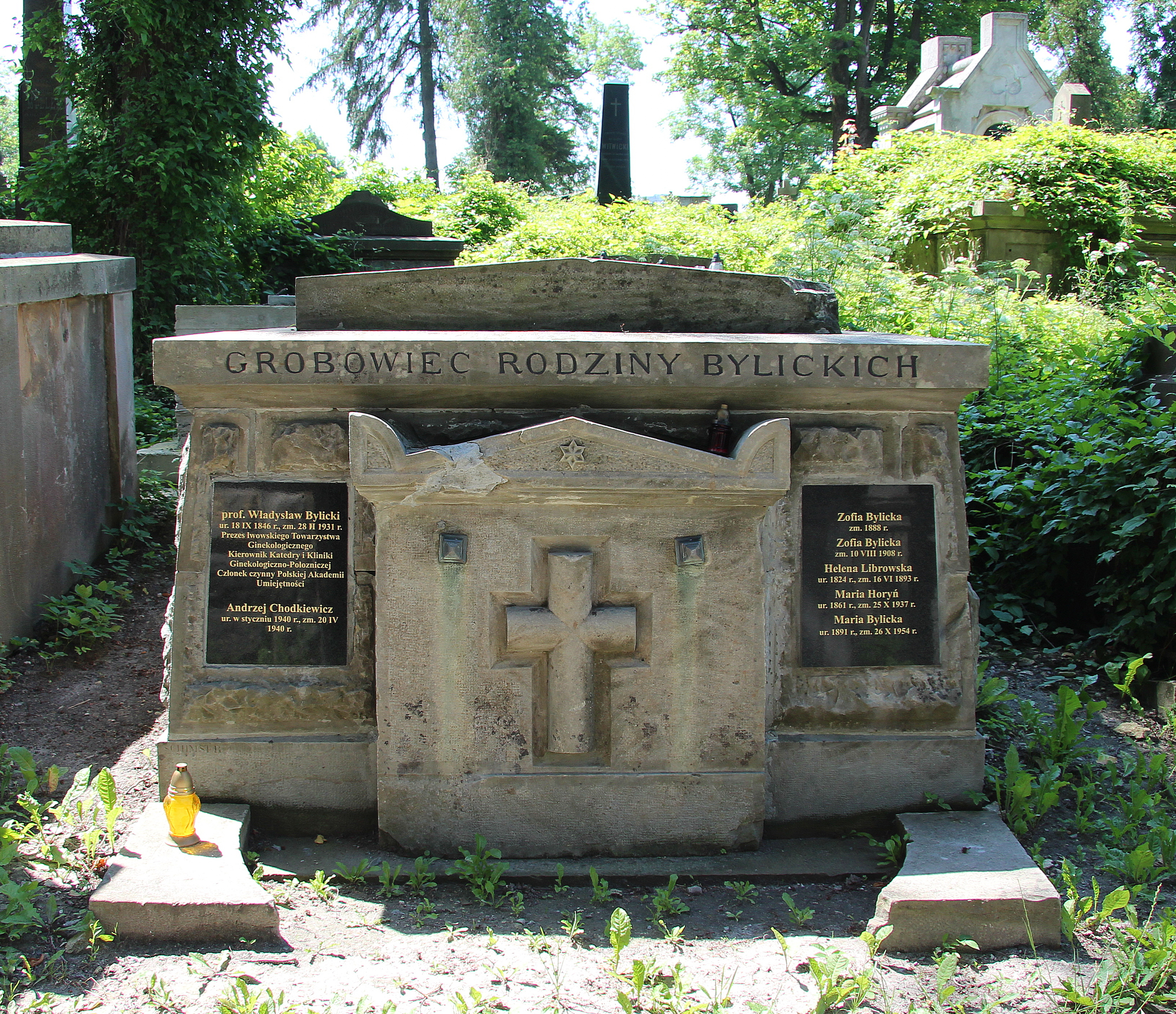 Гробівець родин Булицьких. Личаківський цвинтар , поле № 71.